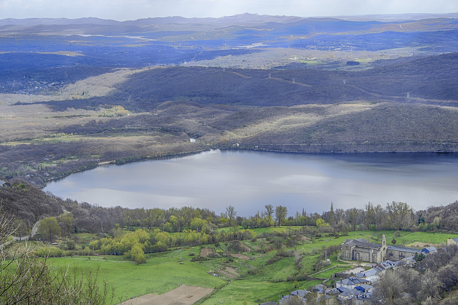 Lago de Sanabria y San Martín de Castañeda ( municipio de Galende) Parque natural del Lago de Sanabria y Alrededores Provincia de Zamora Castilla y León España